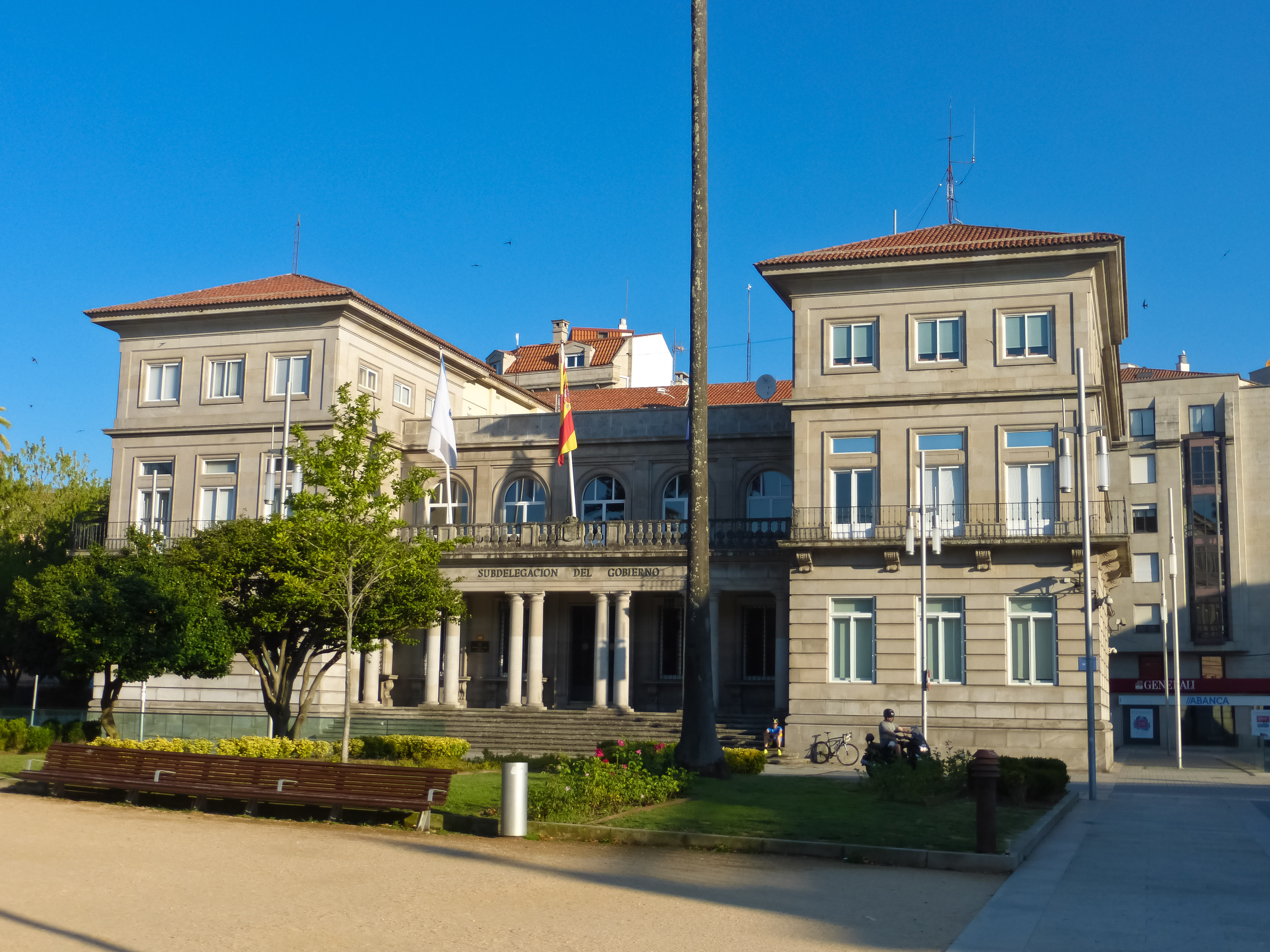 Casco Antiguo de Pontevedra